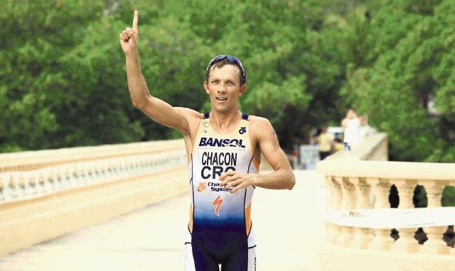 Leonardo Chacon